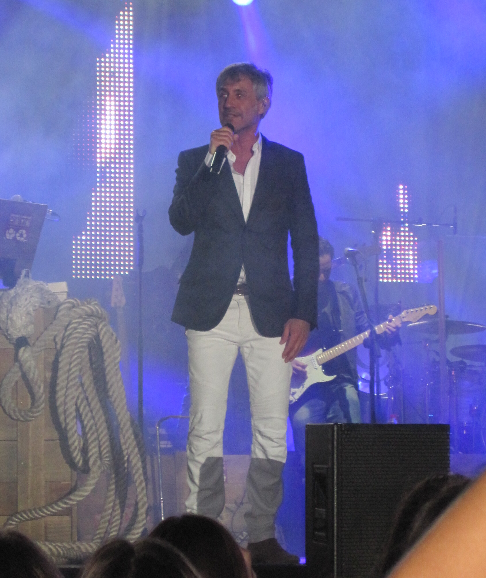 Sergio Dalma en un concierto en Palencia (España), en 2012.